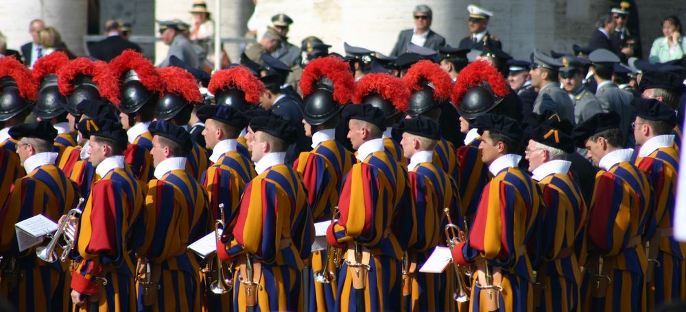 Vatican - gardes suisses